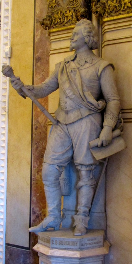 Statue des Charles Bonaventure de Longueval, Comte de Bucquoy in der Feldherrenhalle des Heeresgeschichtlichen Museums in Wien.